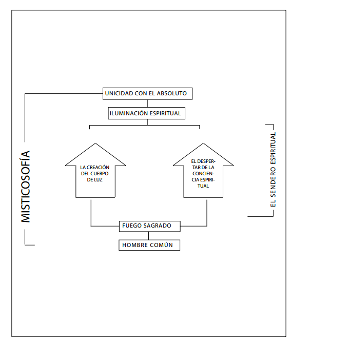 El sendero espiritual - las dos vías